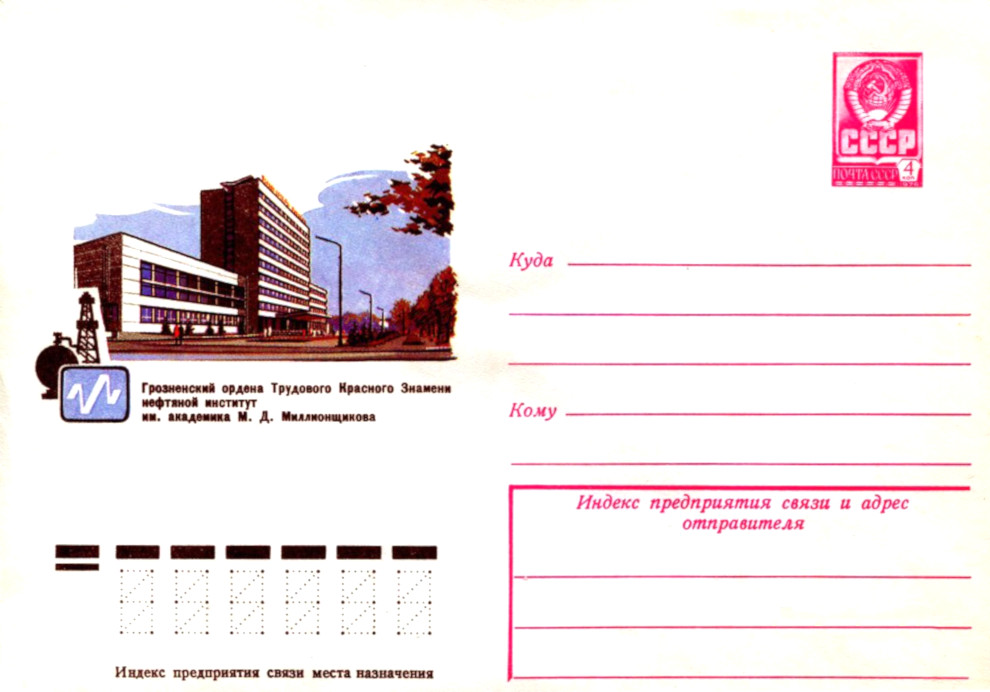 Конверт СССР